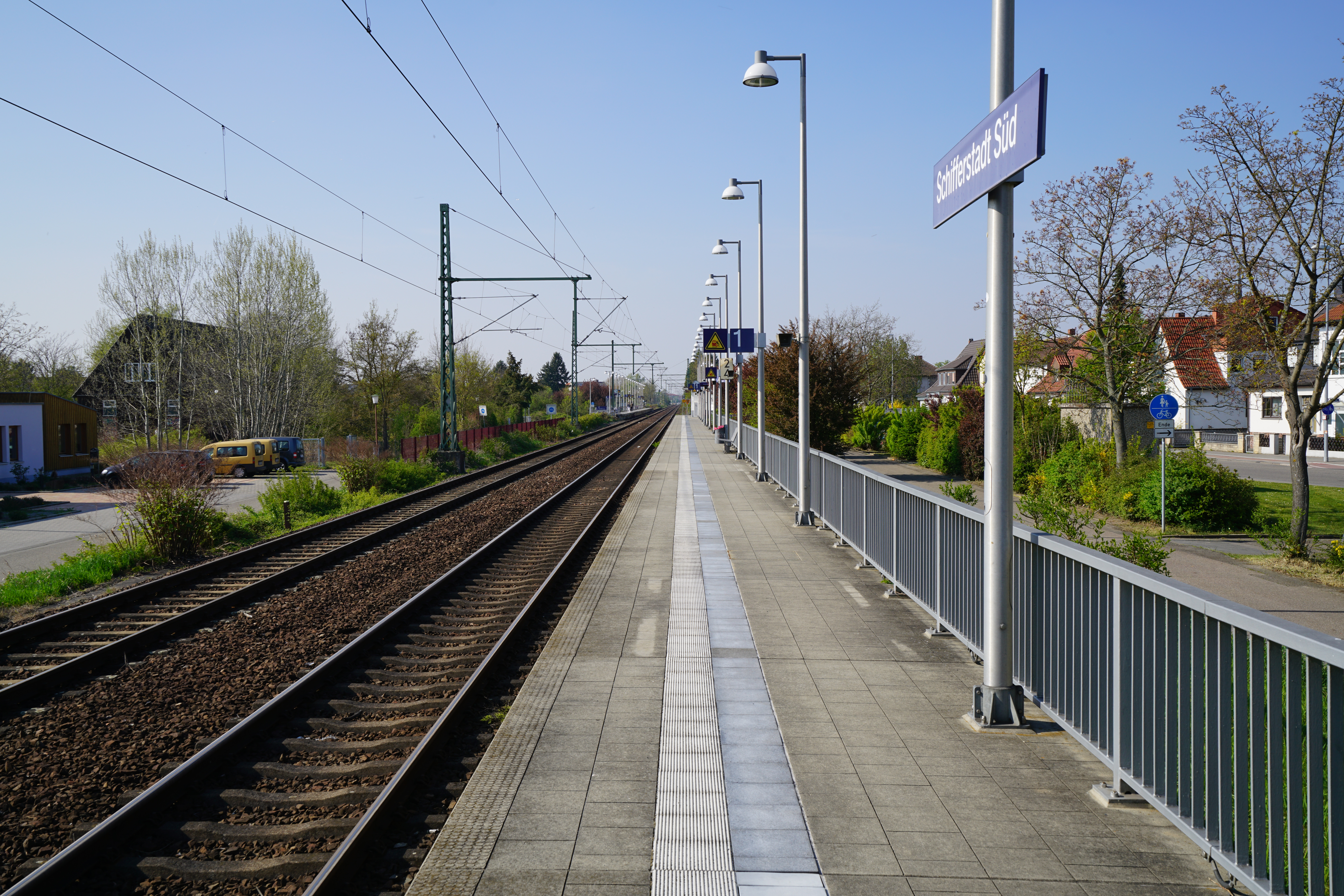 Bahnsteige des Haltepunkts Schifferstadt Süd in Rheinland-Pfalz